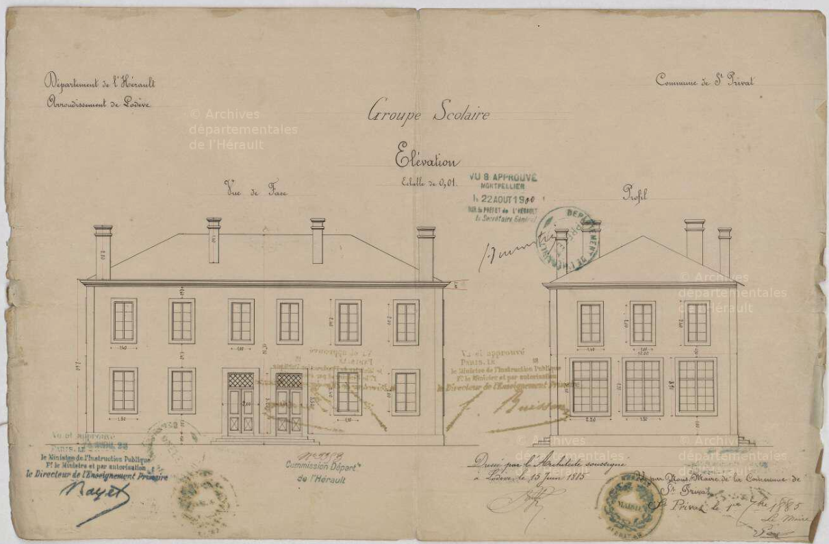 Plans de l'école Des Salces (34) de 1885 (issue des Archive Départementale de l'Hérault)